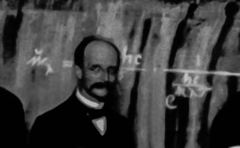 Erste Solvay-Konferenz von 1911. Max Planck